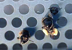 Rejilla cazapoen